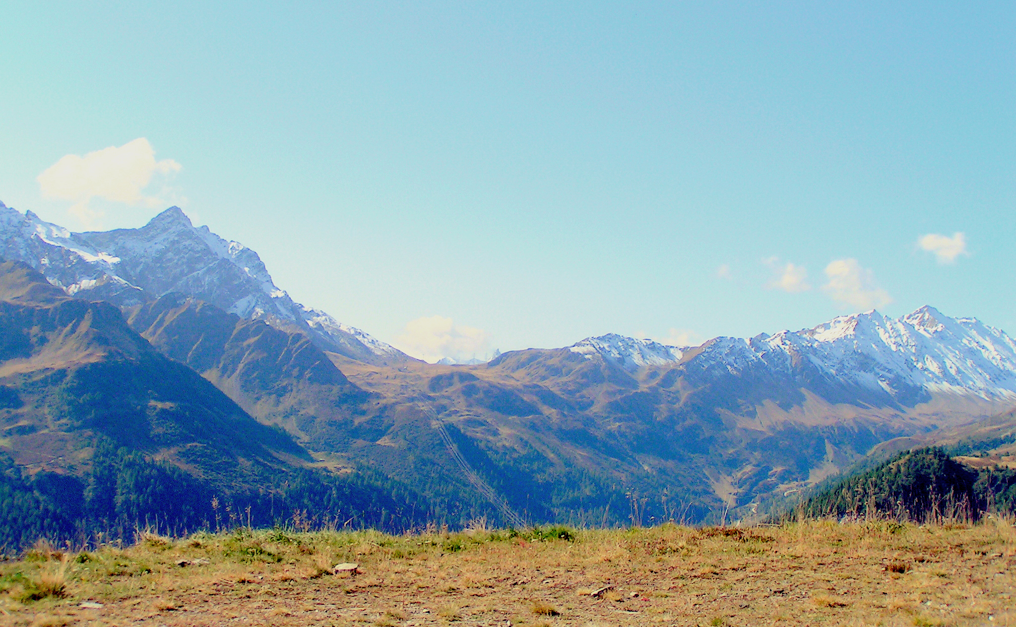 Passo San Giacomo dalla Val Bedretto